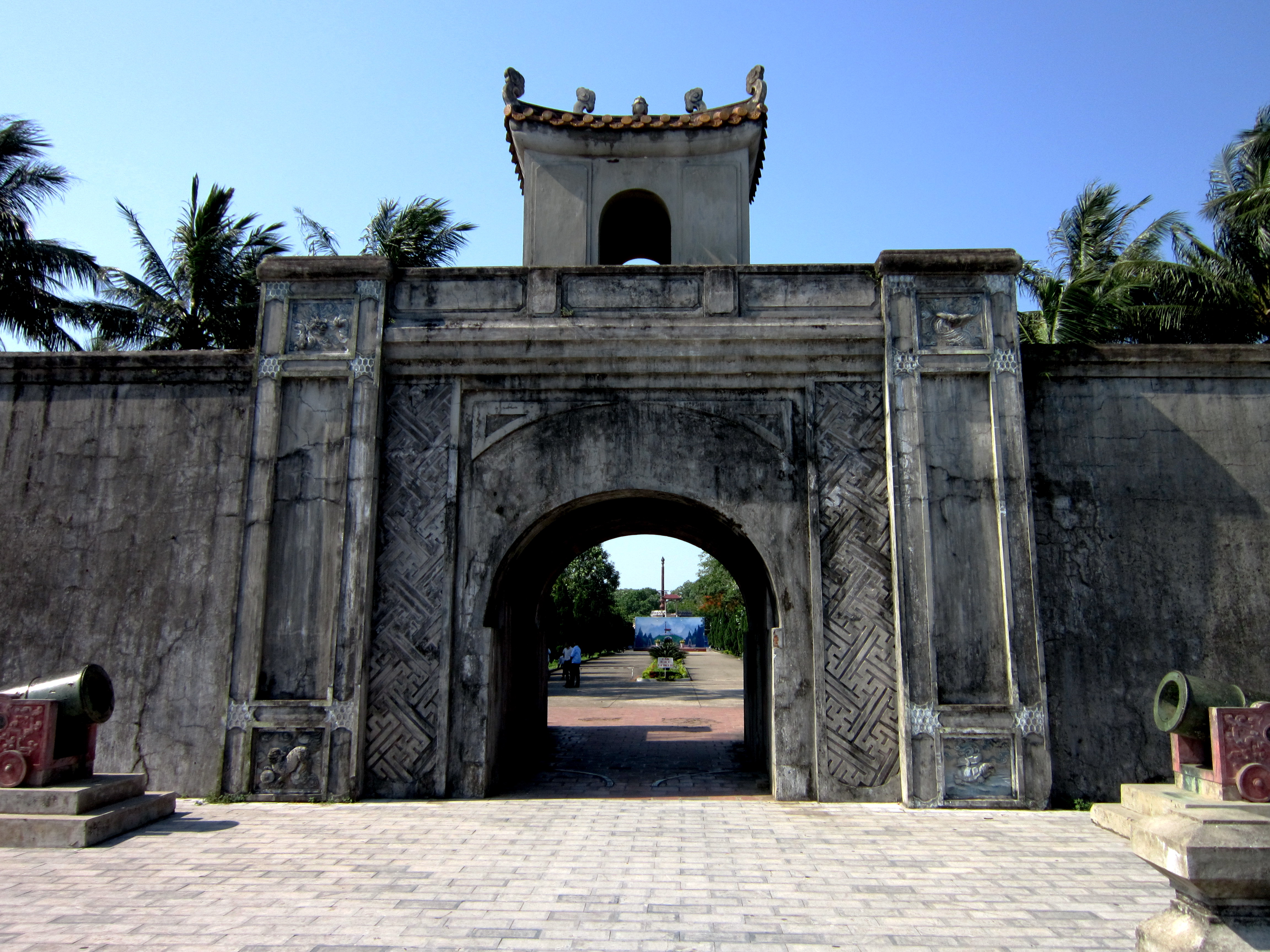 Cổng chính của tòa thành cổ Quảng Trị nằm ở trung tâm thị xã Quảng Trị, tỉnh Quảng Trị, Việt Nam.